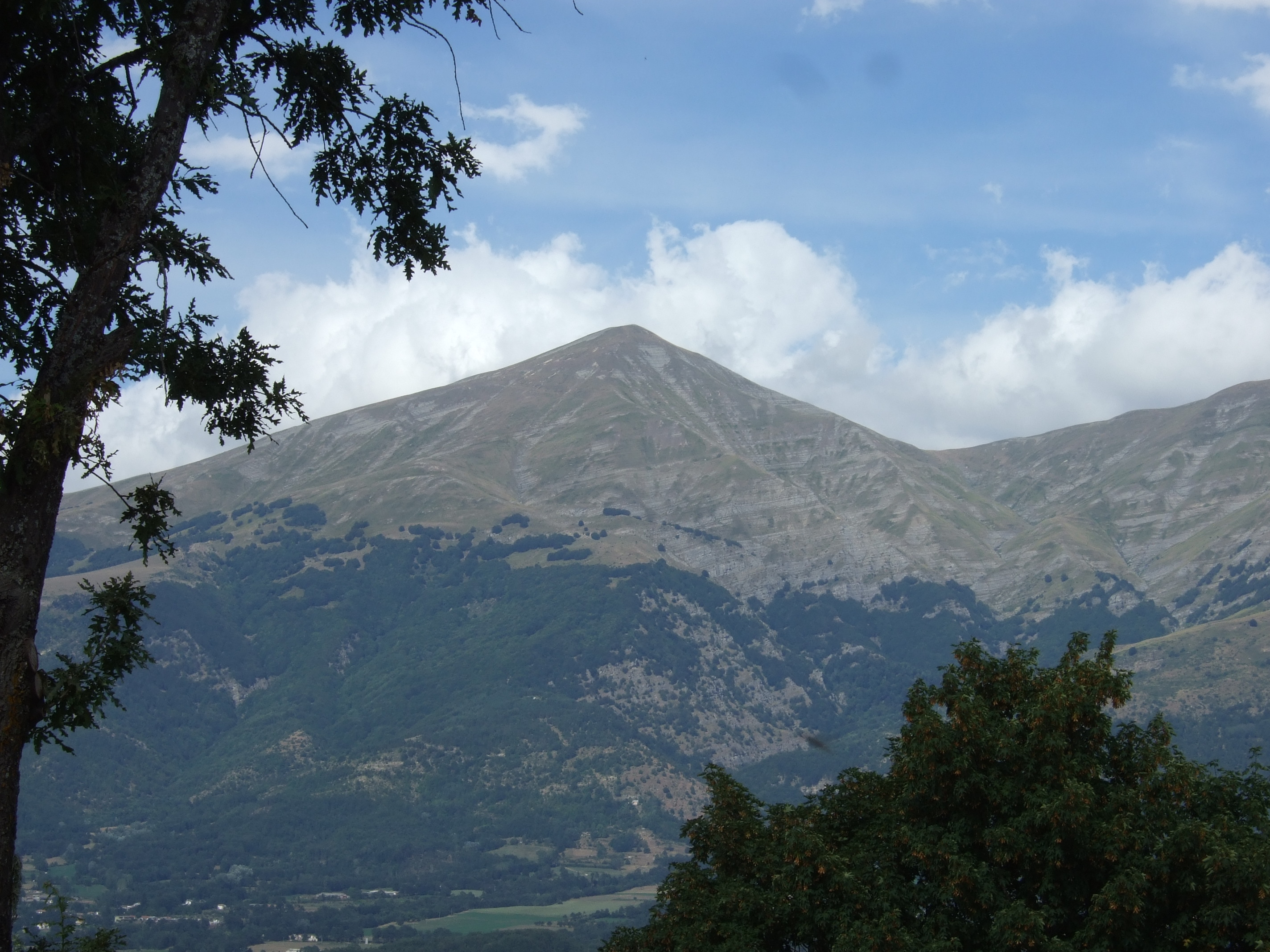 Pizzo di Sevo (Italy). Versante ovest